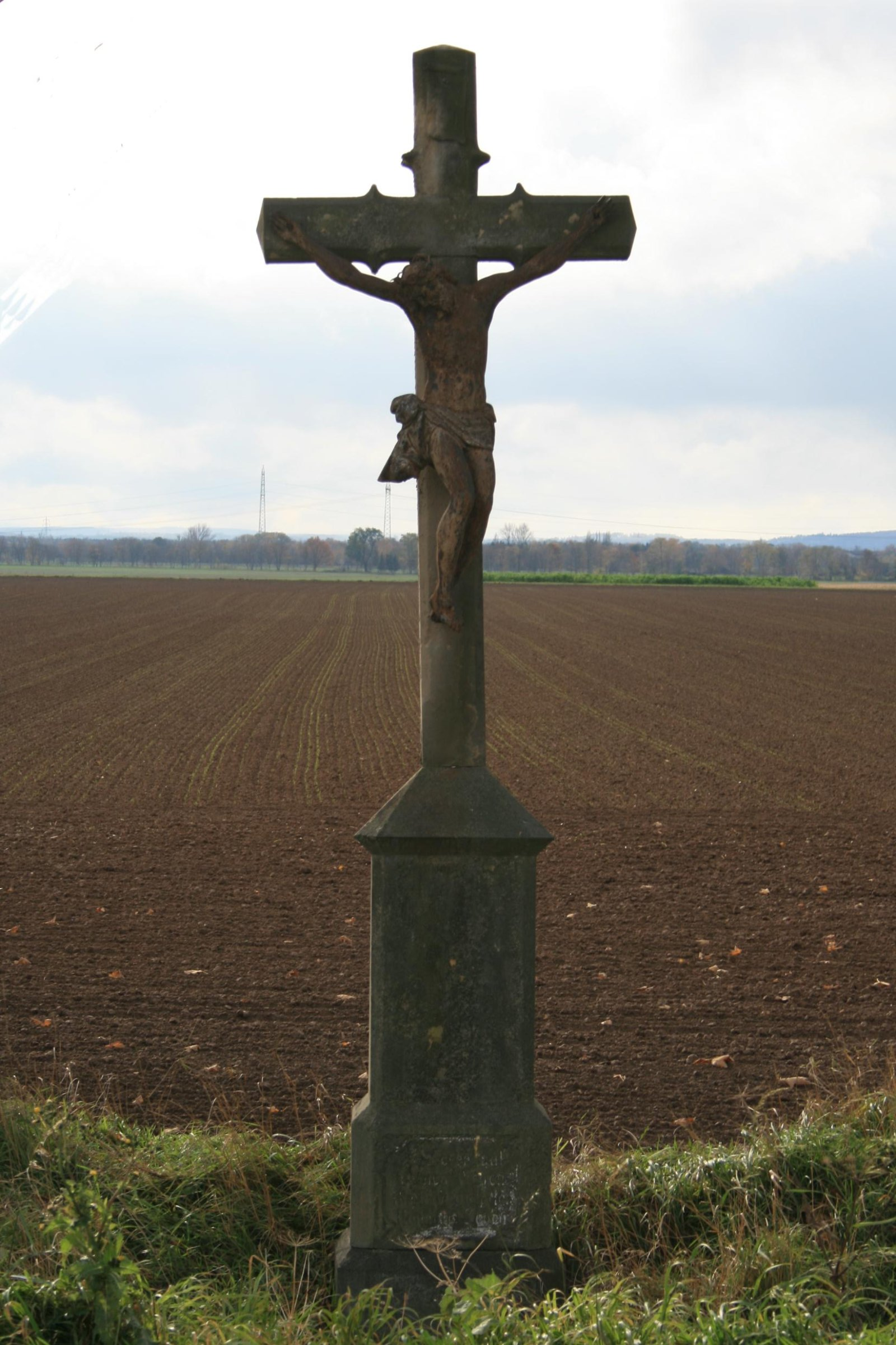 Wegekreuz, An der Landstraße 271, Nörvenich-Binsfeld